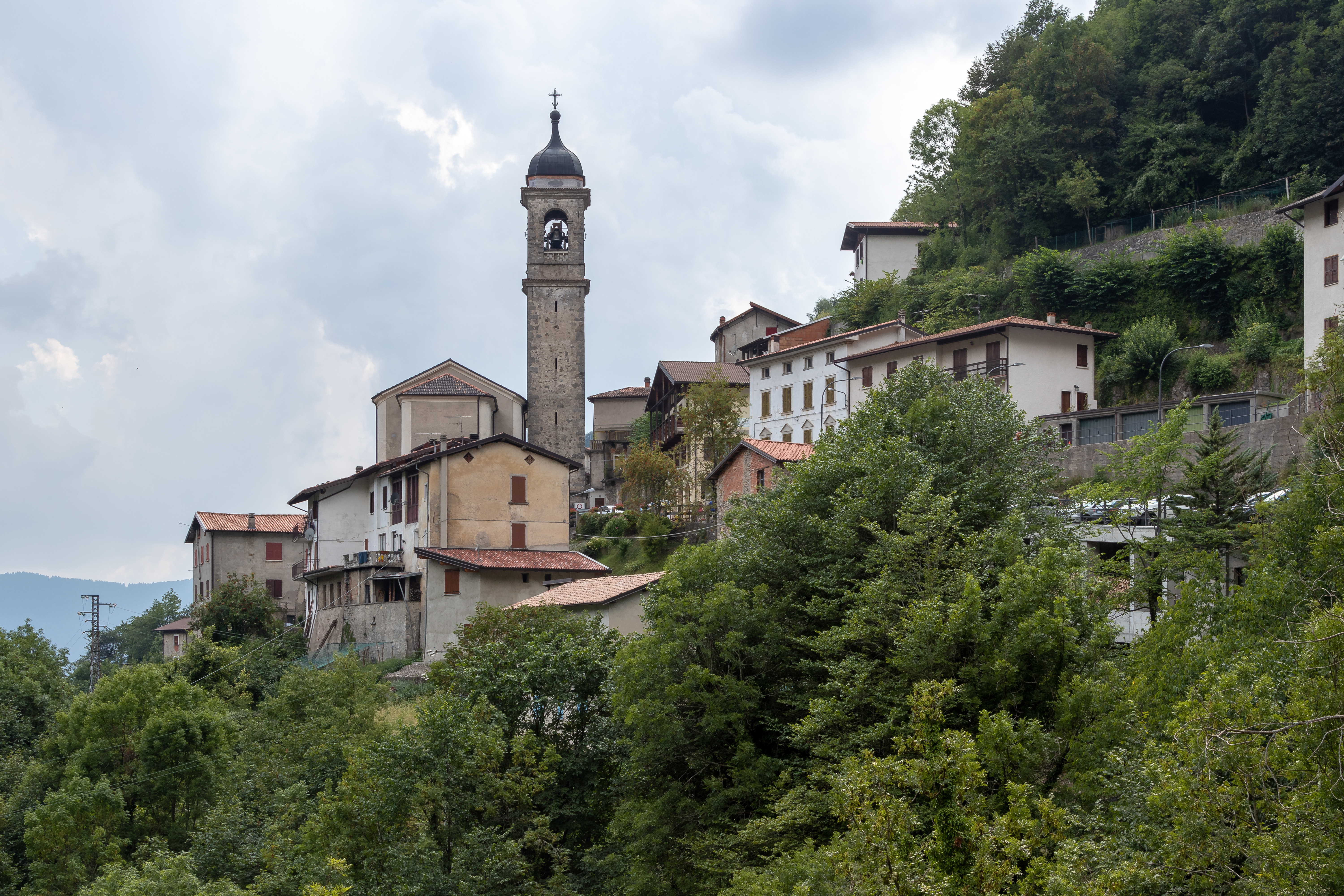 Magasa